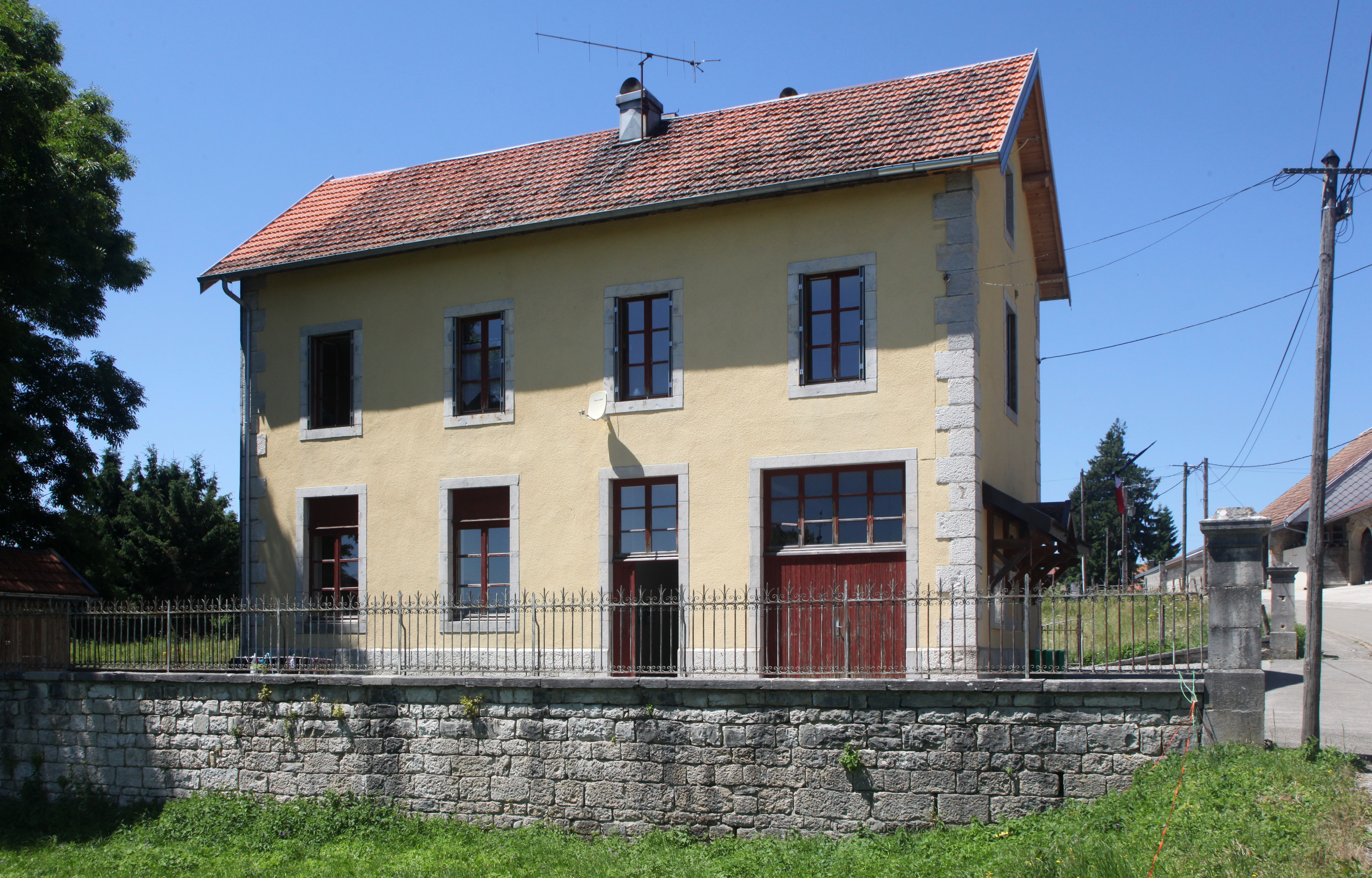 Mairie de Longcochon (Jura).